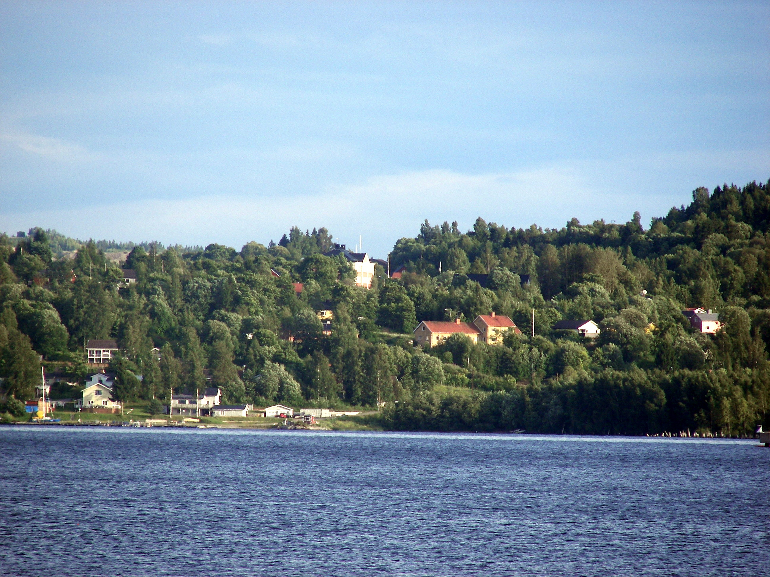 Gångviken i Sundsbruk sett från Vivstavarv.